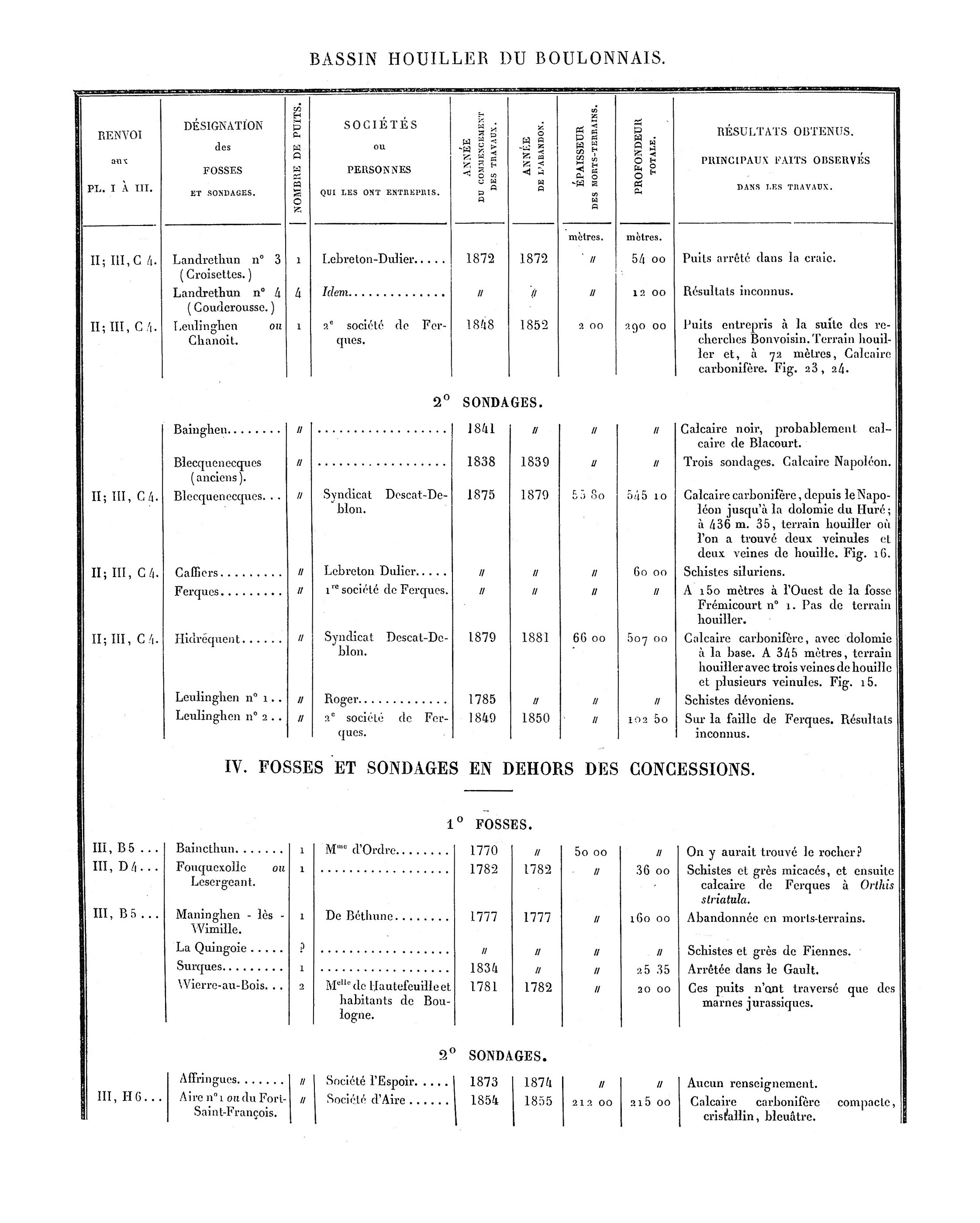 Liste des puits de mine et des sondages. Mines du Boulonnais. Document extrait de Étude des Gîtes Minéraux de la France. Topographie Souterraine du Bassin Houiller du Boulonnais ou Bassin d'Hardinghen, par A. Olry, ingénieur en chef des Mines. Chapitre IX, pages 172 à 189.